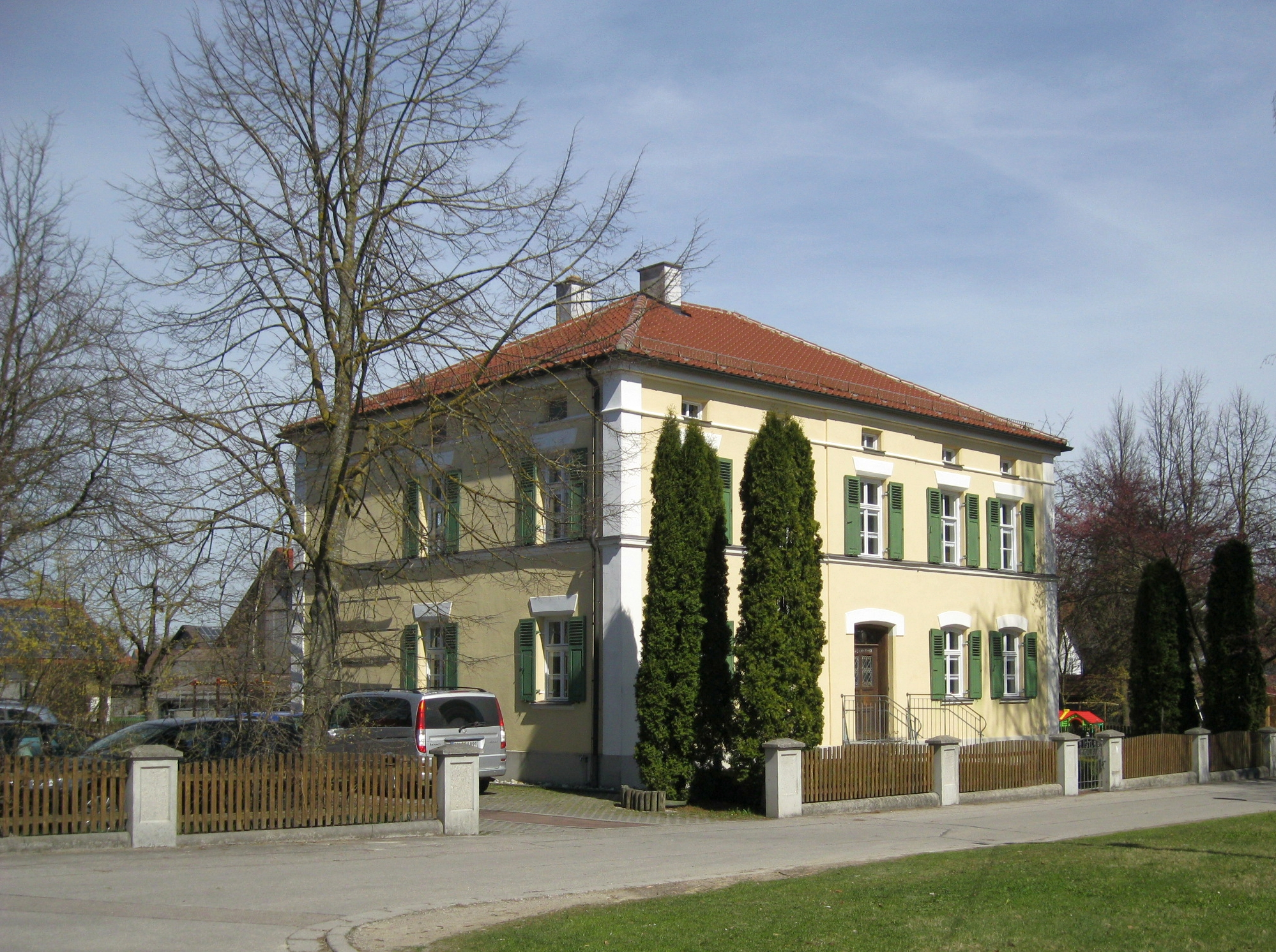 Ehemaliges Pfarrhaus, heute Kindergarten Sankt Nikolaus in Wiedergeltingen